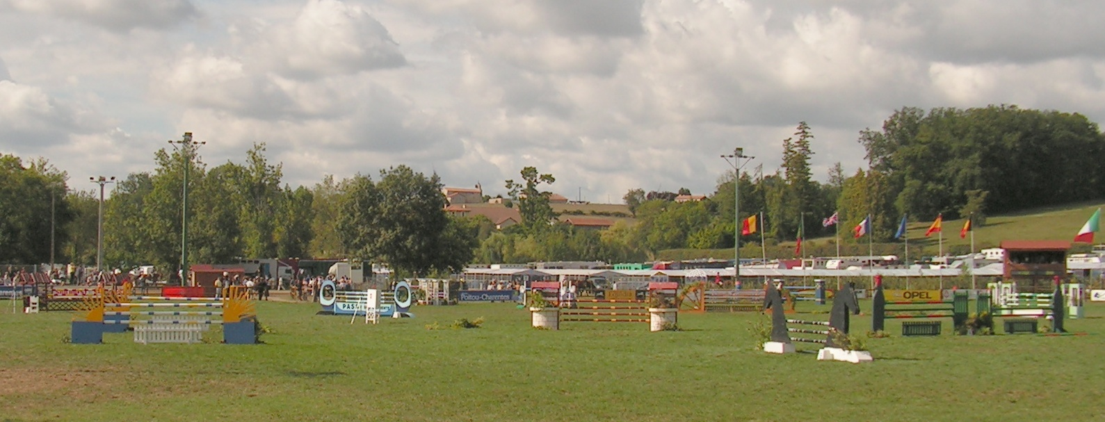 Chalais (France 16) en août 2006.